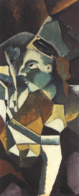 Selbstbildnis